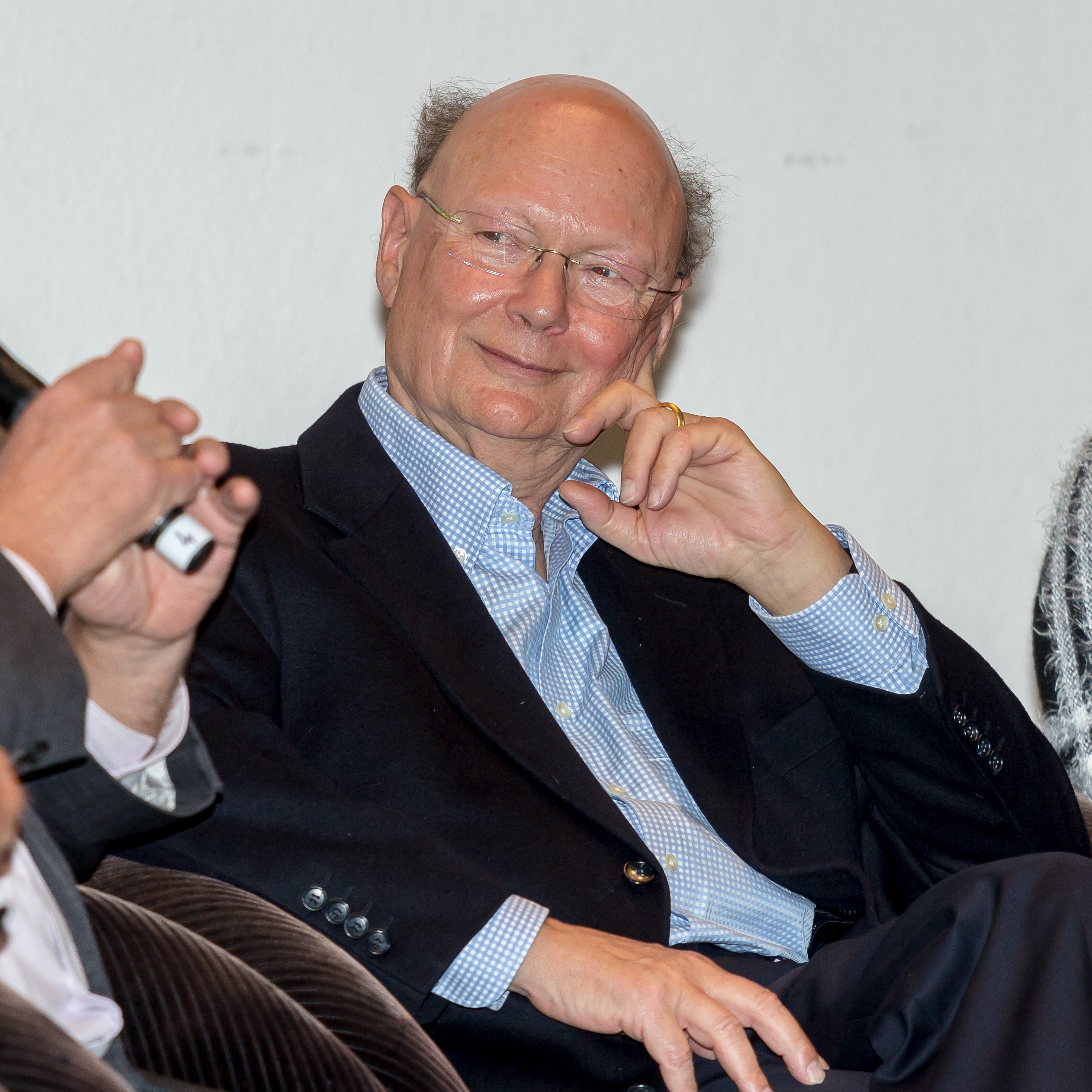 Podiumsdiskussion „Was heißt heute Toleranz“ in der Piazetta des Historischen Rathauses der Stadt Köln. Veranstalter: Freunde des Historischen Archivs der Stadt Köln Foto: Publizist Günther Bernd Ginzel